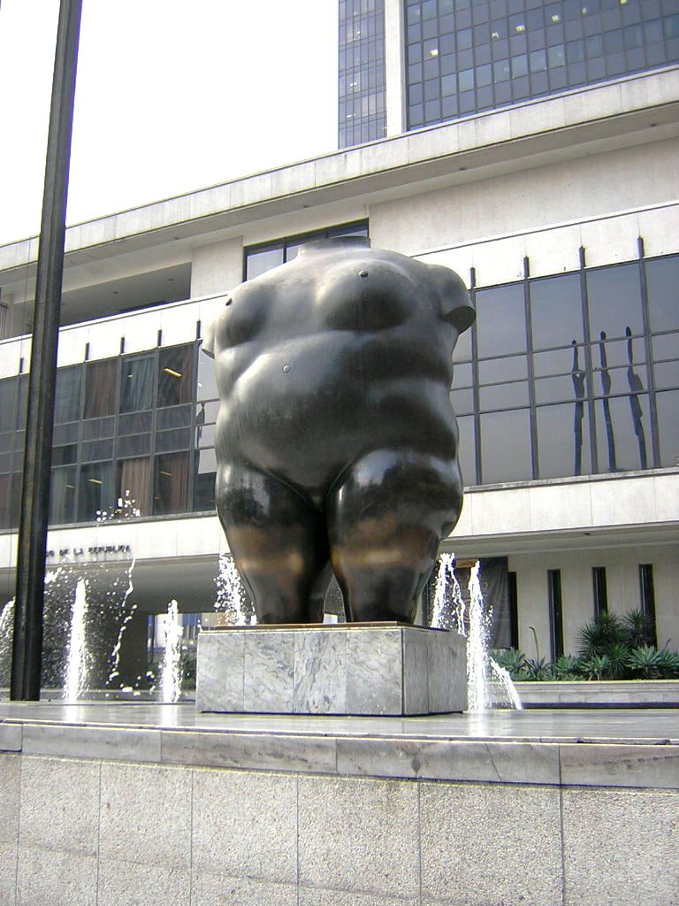 Torso de Mujer mas conocida como la "La Gorda", fue la primera escultura monumental donada por Fernando Botero en 1987. Ubicada en el Parque Berrio, Medellín, Colombia.